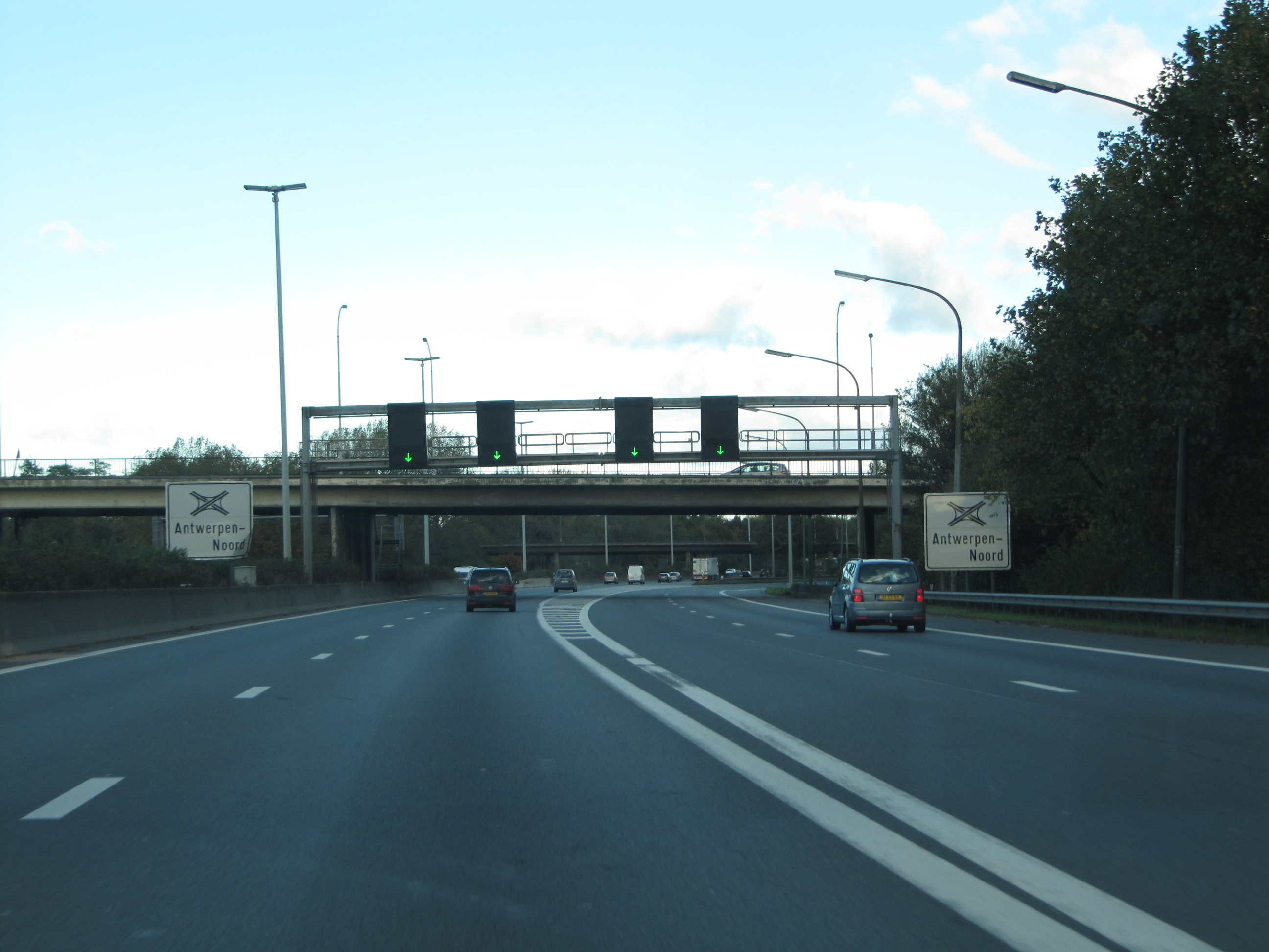 Knooppunt Antwerpen-Noord